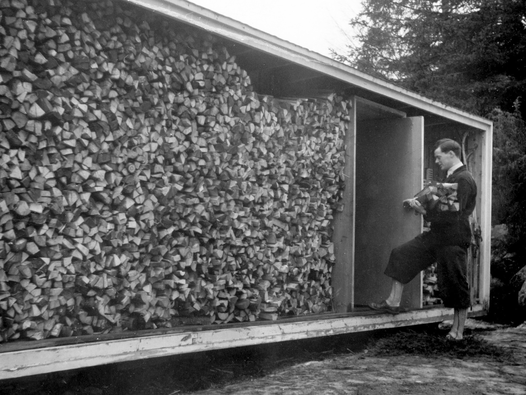 "Lådan", baksidan med vedupplägg och Erskine